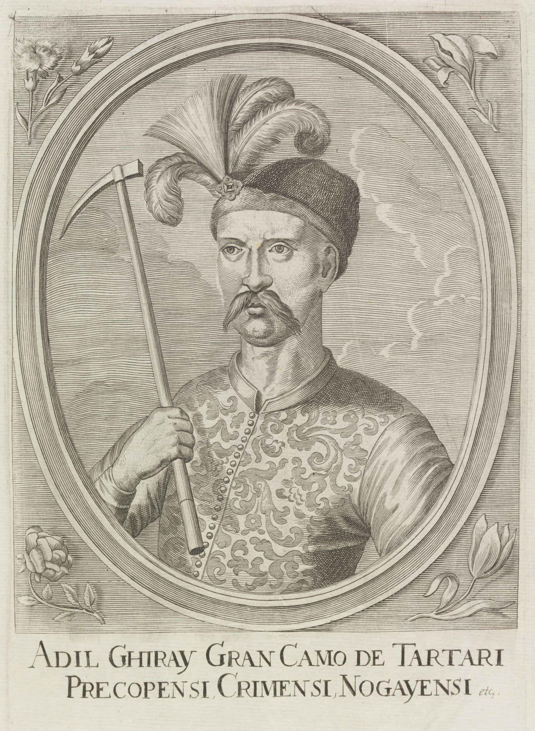 Антикварная гравюра на меди, отпечатана в Вене, размер листа 29х20,2 см, размер оттиска 24,5х16,5 см.